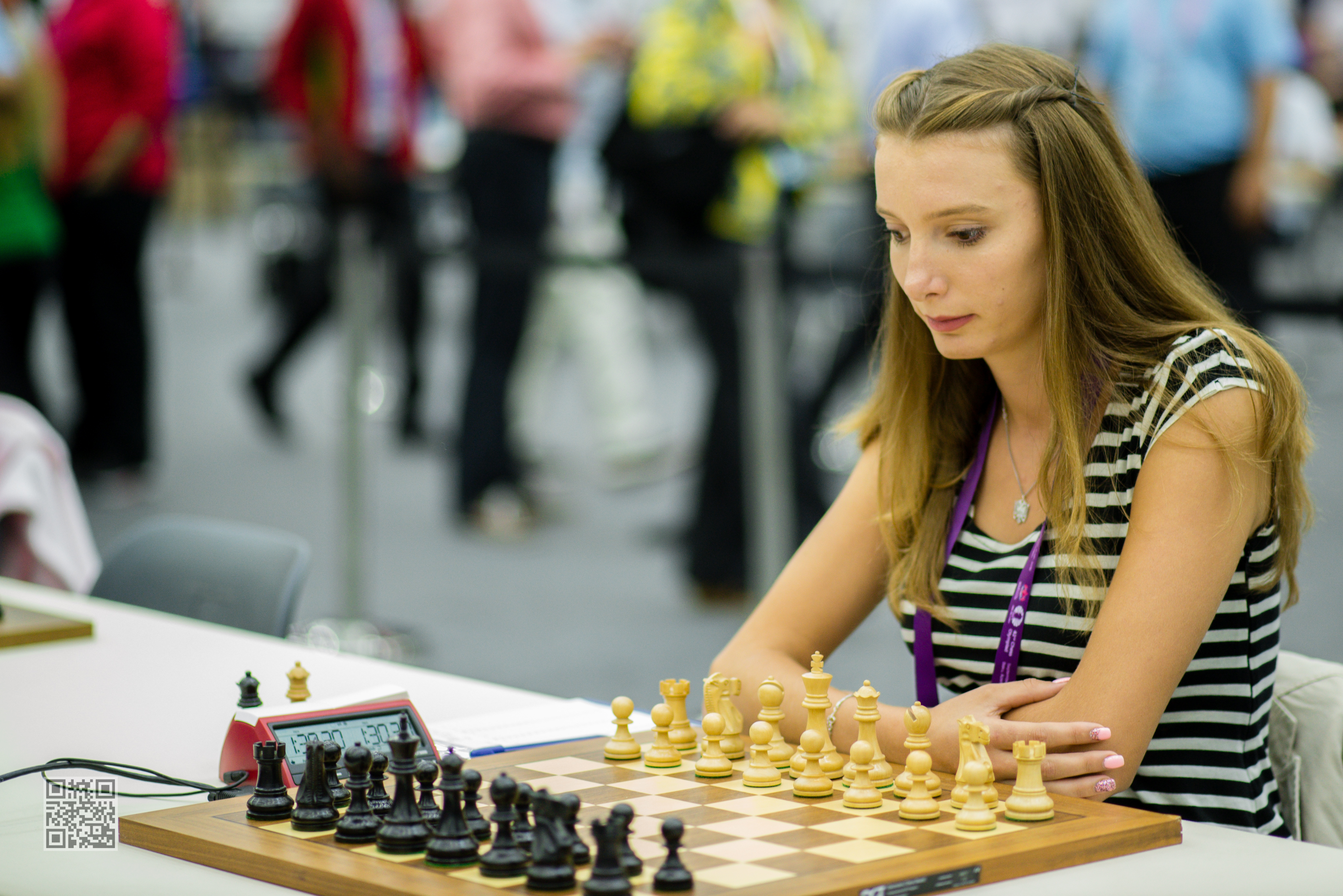 Bruna Tuzi